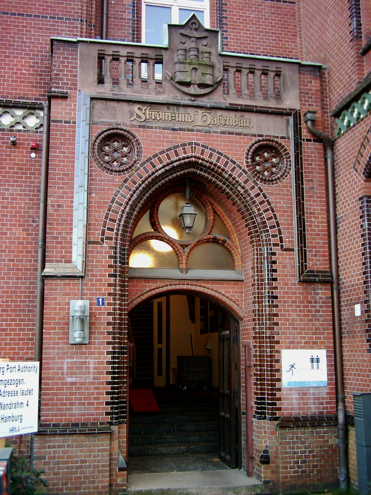 Altes Gebäude des Amtes für Strom- und Hafenbau (heute Hamburg Port Authority) in der Dalmannstraße, Hamburg-Klostertor. This is a photograph of an architectural monument.